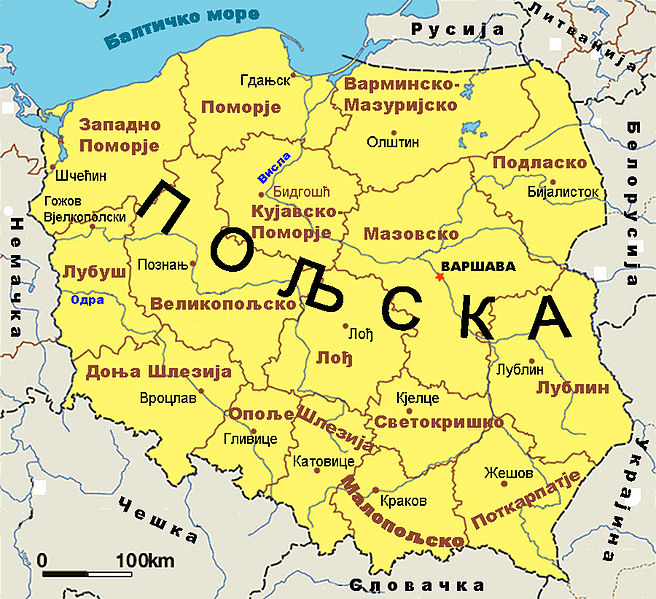 Аутор: Саша Костић Корисничко име: Леса Цртеж у Фотошопу Licensing